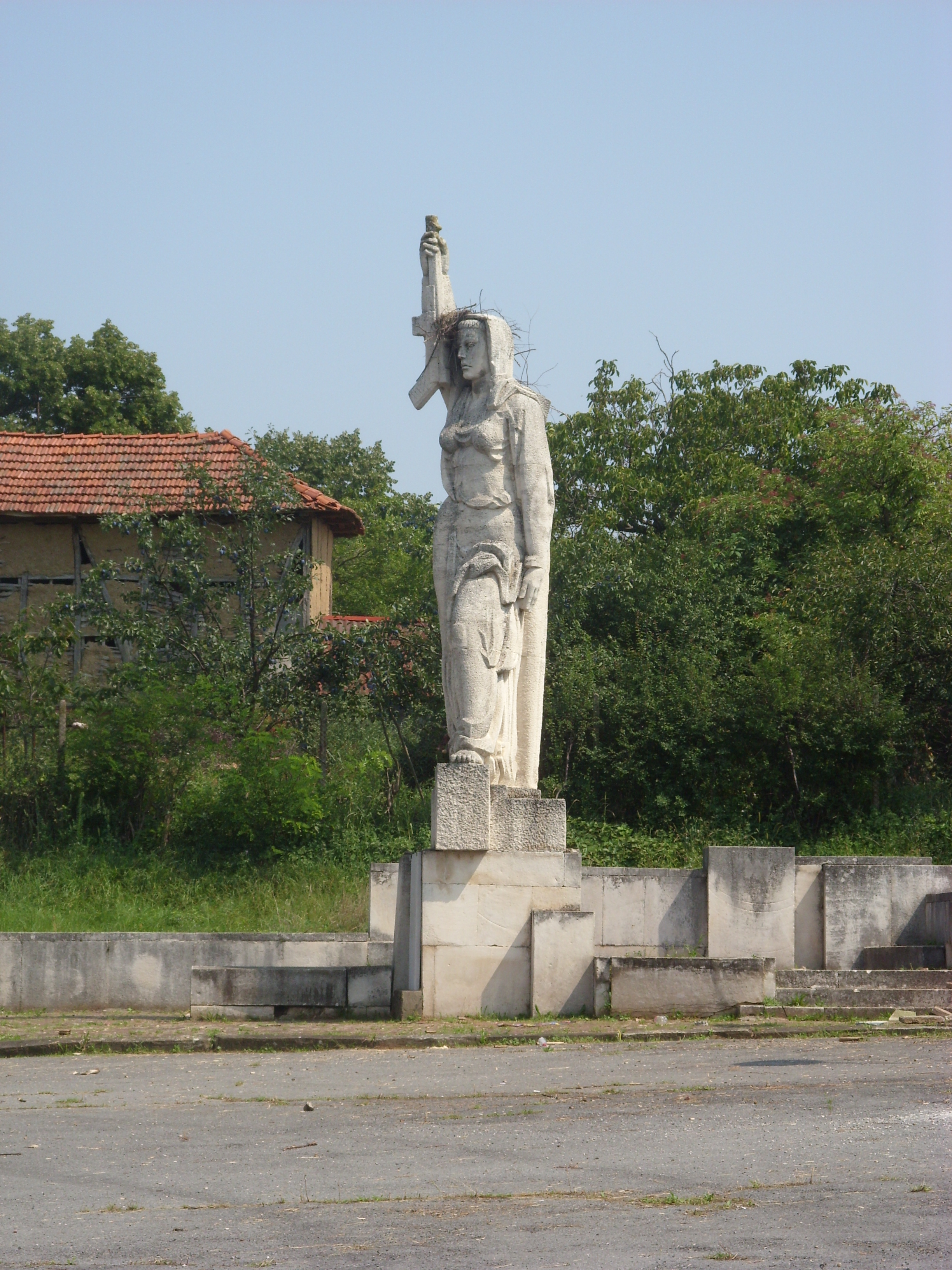 Паметник на партизаните и ятаците от селото